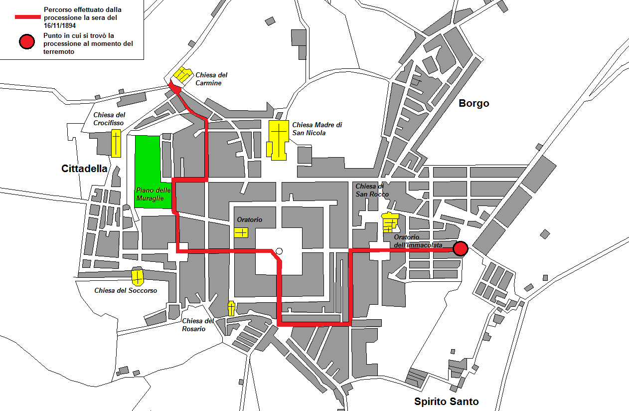 Percorso effettuato dalla processione di Maria Santissima del Carmelo per le vie di Palmi, la sera del 16 novembre 1894.